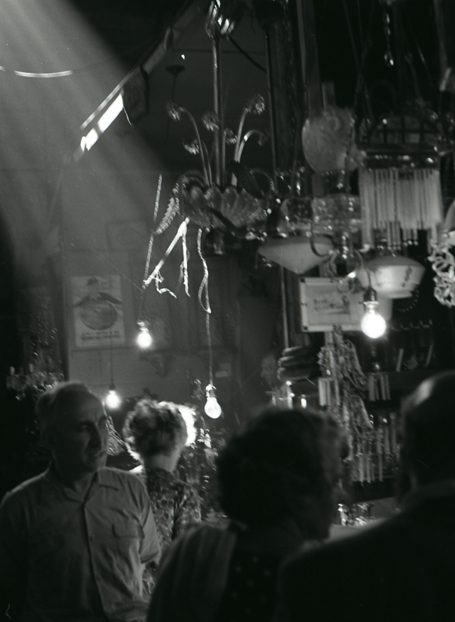 Serie fotografica : Istanbul, 1962 / Paolo Monti. - Strisce: 6, Fotogrammi complessivi: 35 : Negativo b/n, gelatina bromuro d'argento/ pellicola ; 35 mm. - ((I fotogrammi hanno una doppia numerazione. - Sul portanegativi: Pentax FP3. - Fonte: Agenda di Paolo Monti: Foto Leica 1 / 1-51 verde, 1-110 nera (1958-1963), presso Archivio Paolo Monti